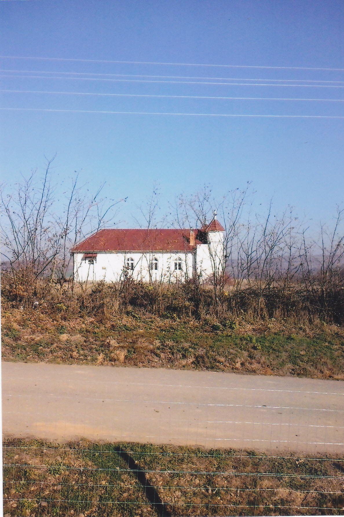 Biserică Baptistă construită în anul 2000